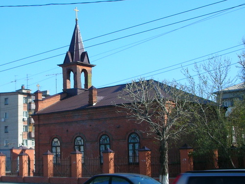 La katolika preĝejo honore al la Josefo Fianĉo (Tjumeno, Rusio) Католический костёл в Тюмени